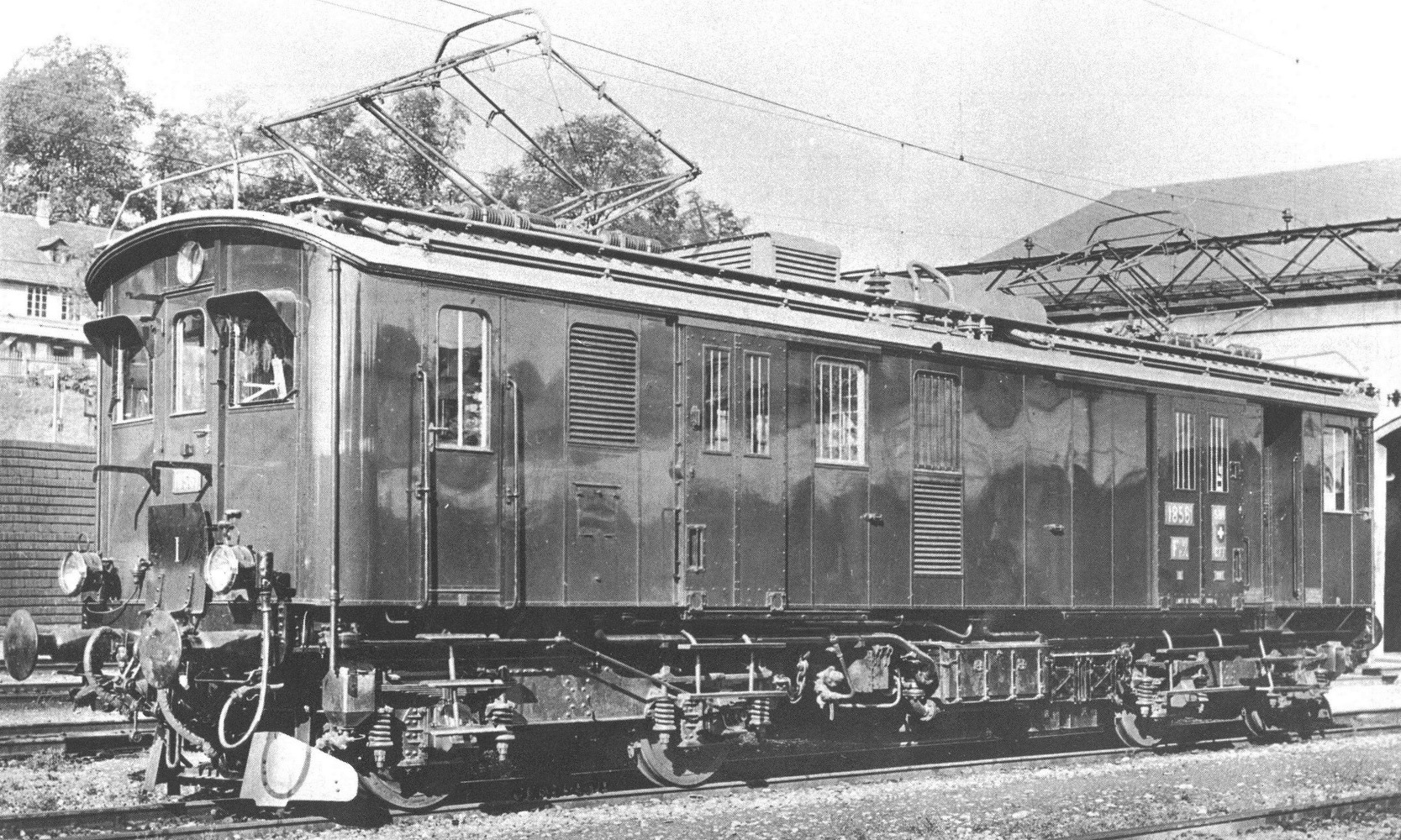 Elektrischer Gepäck-Triebwagen Fe 4/4 18561 im Ursprünglichen Zustand mit beiden Stromabnehmer an den Fahrdraht angelegt im Jahre 1930. Mit Emailplattenbeschriftung.